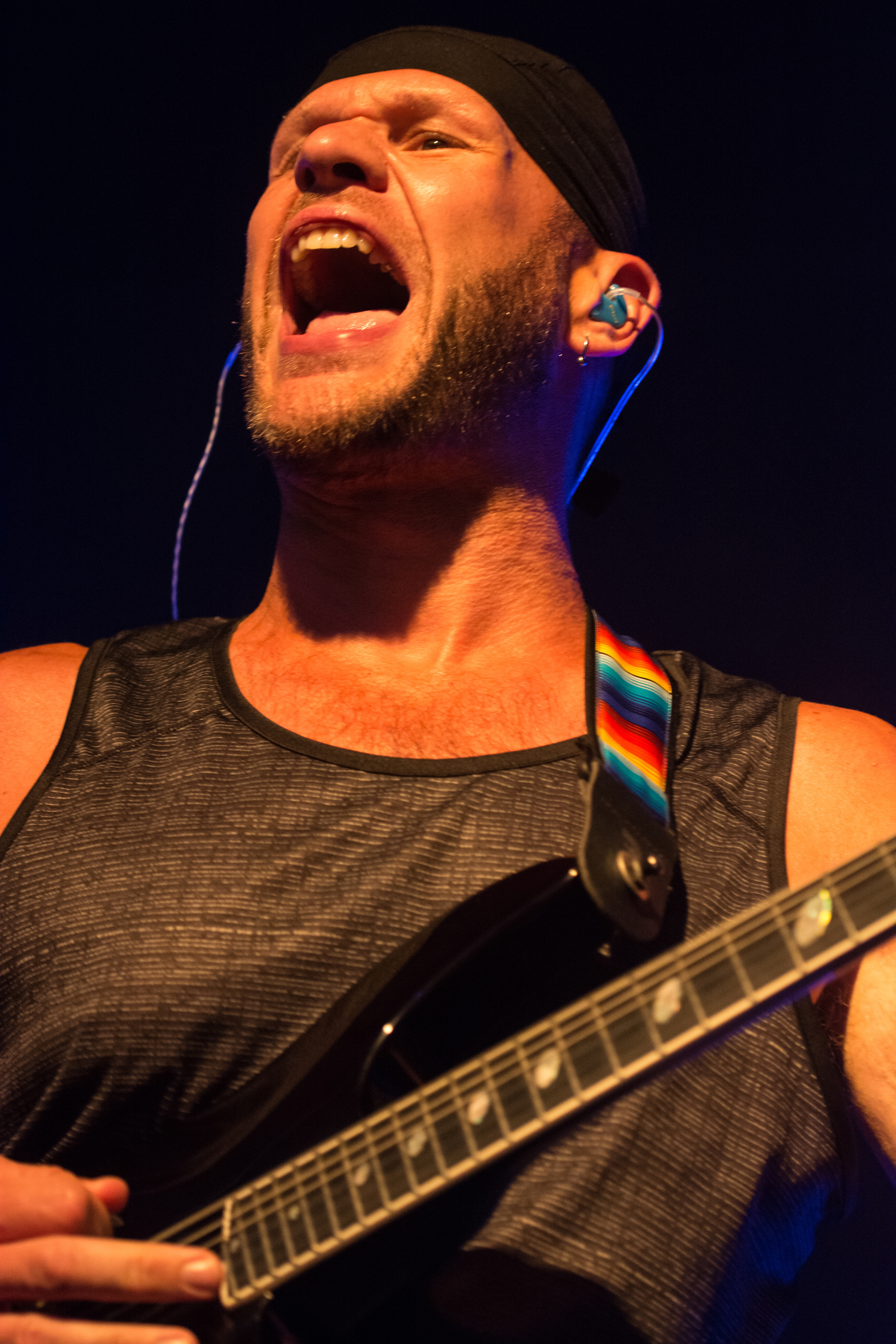 Killswitch Engage beim Rawk Attack 2016